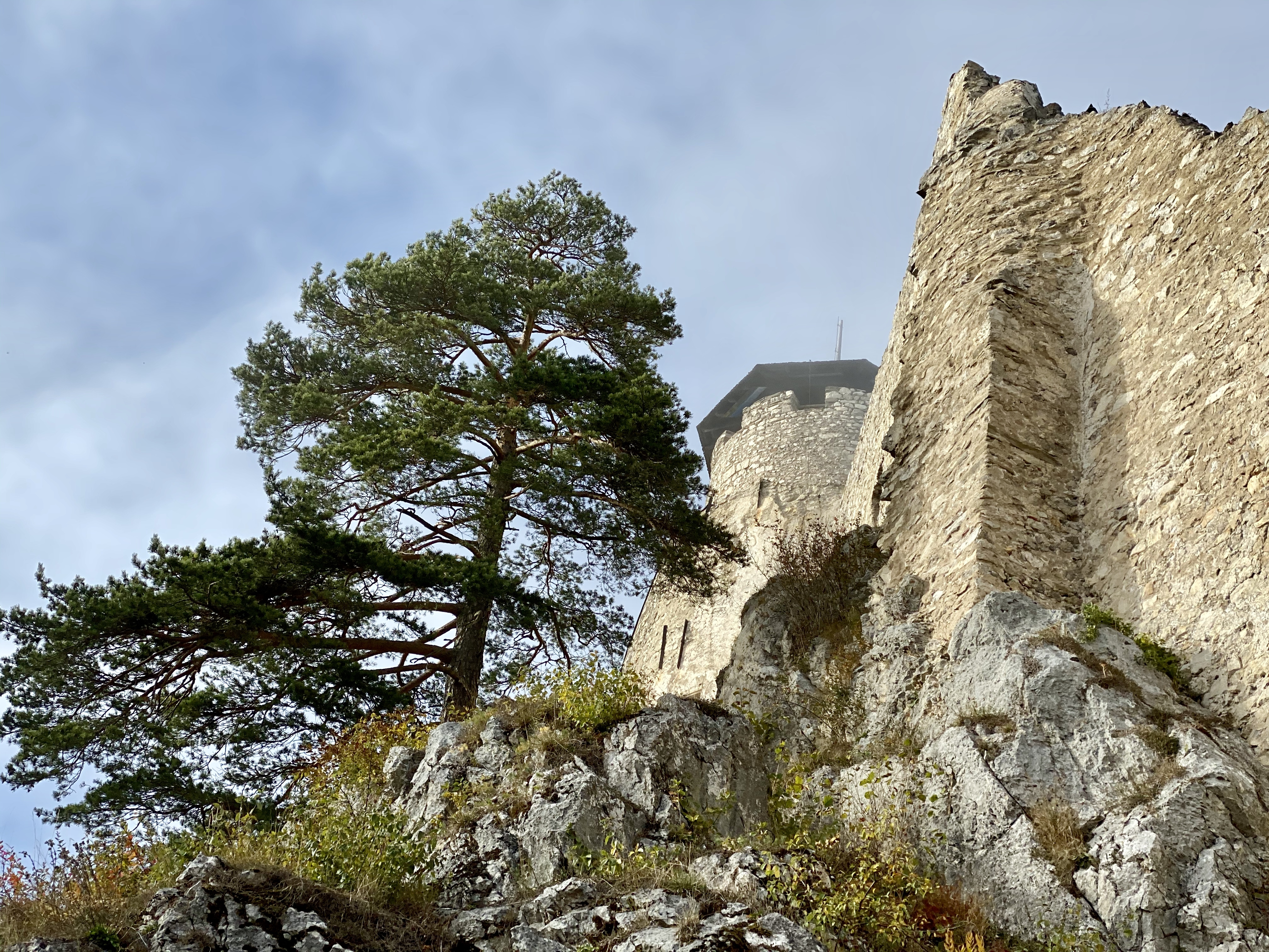 Burgruine Araburg